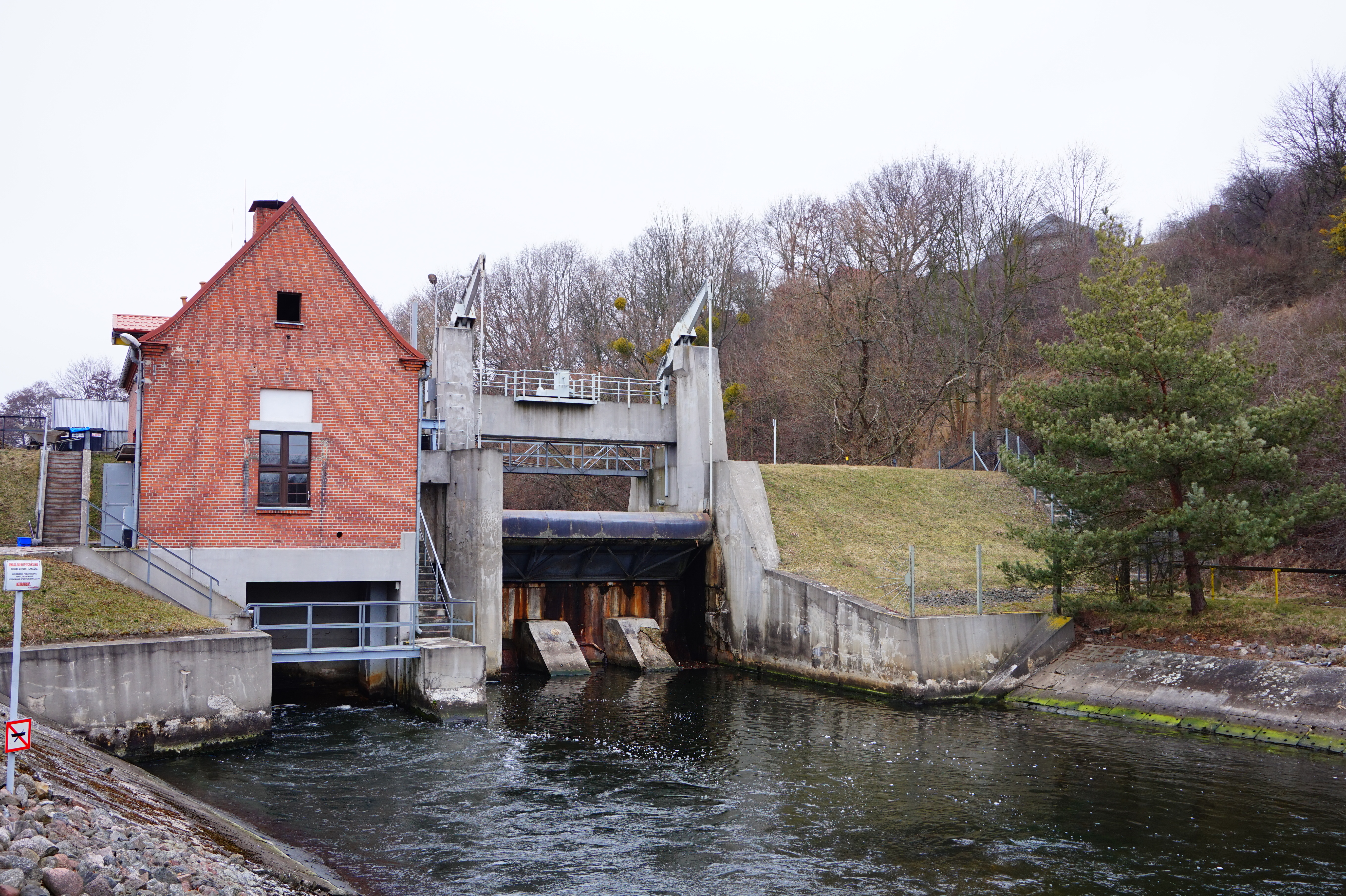 Elektrownia wodna. Wieś Juszkowo, pow. gdańsk